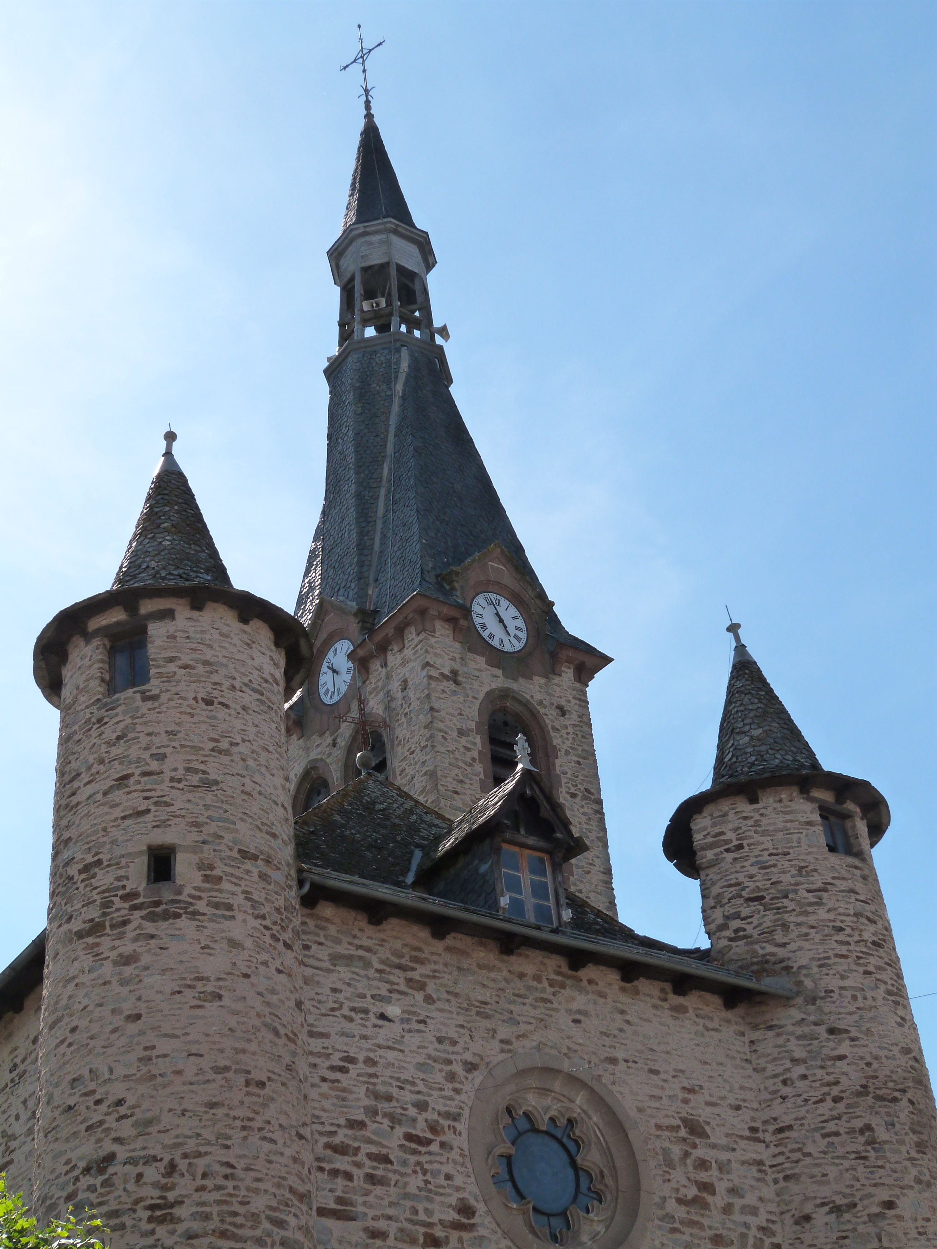 Clocher et partie haute de la façade nord de l'église Saint-Martin de Naucelle (Aveyron)